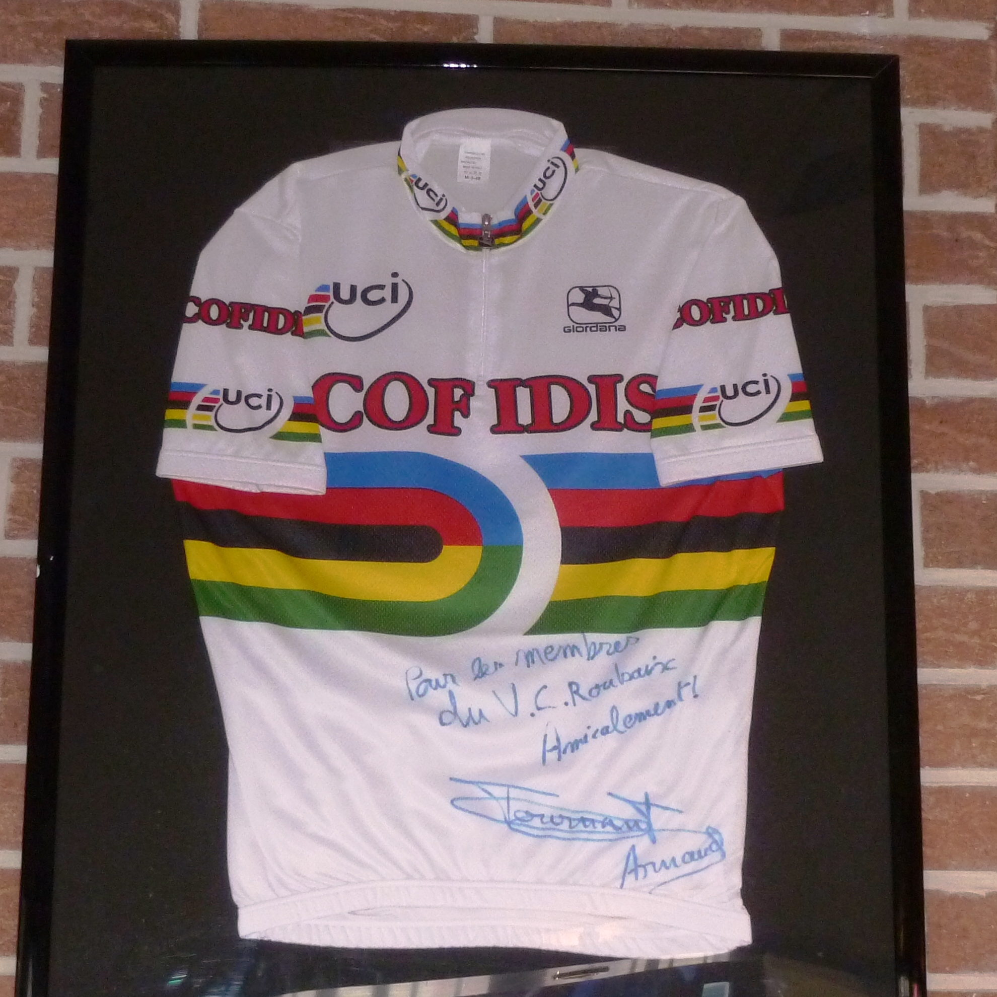 WM-Trikot von Arnaud Tournant im Café des Velodroms von Roubaix